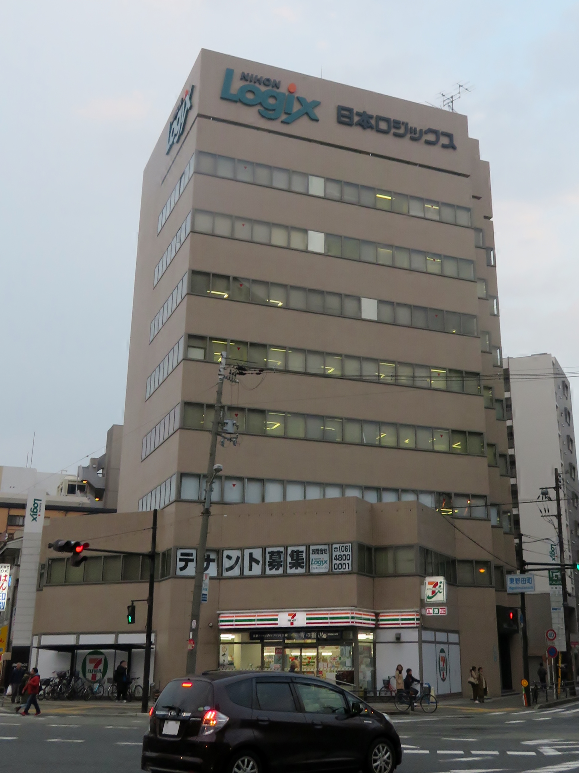 日本ロジックス大阪東野田ビルを撮影。